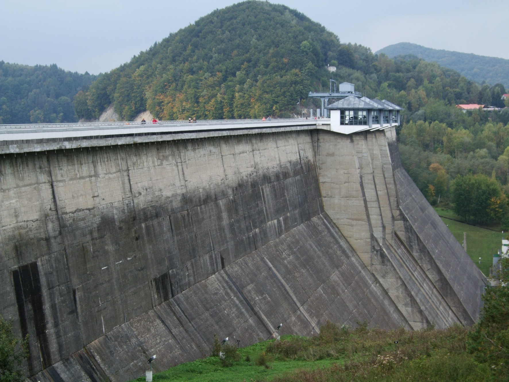 Tama na zbiorniku w Solinie